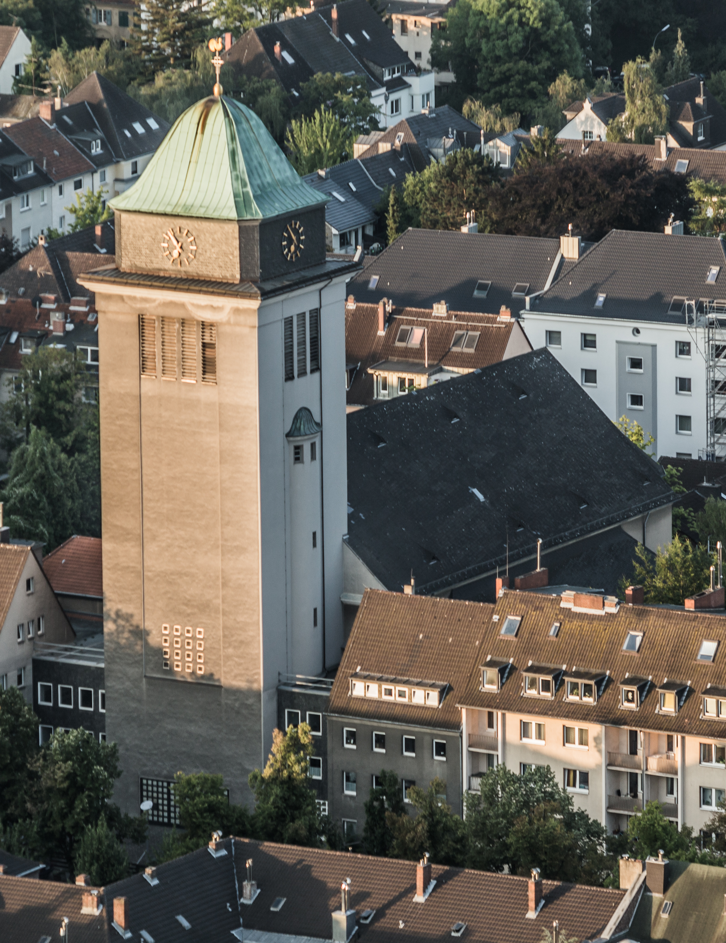 Hot air balloon trip across Cologne. Sankt Bruno, Klettenberggürtel